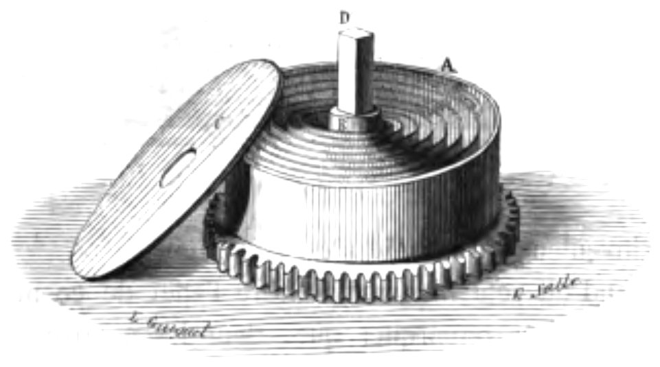 Fig. 21. — Ressort moteur des horloges enfermé dans le barillet A muni d’une roue dentée. — B, axe à tête carrée D pour remonter le ressort détendu. — c, couvercle du barillet, découvert dans la figure pour laisser voir le ressort.